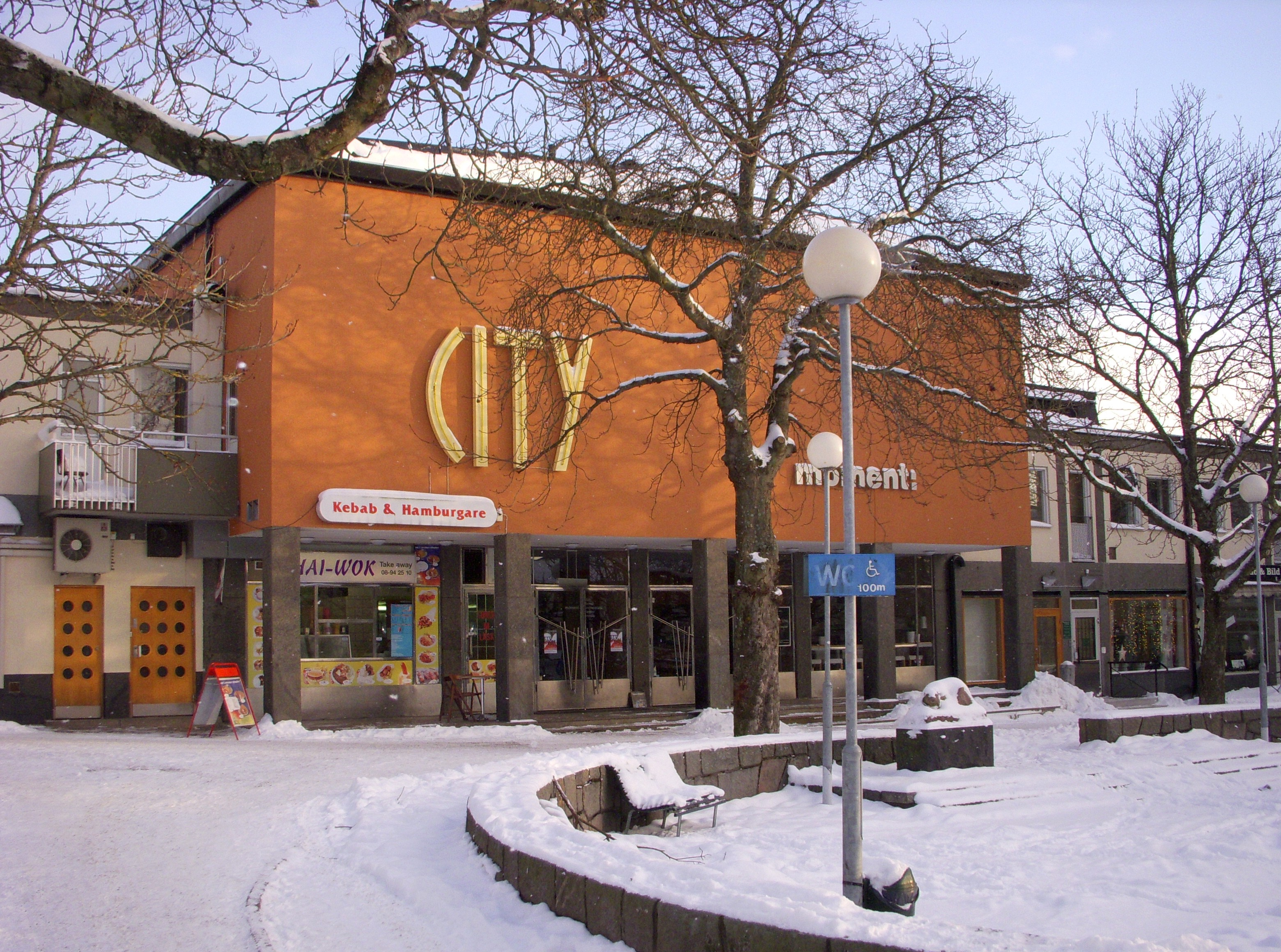 Före detta biografen "City" i Gubbängen, södra Stockholm